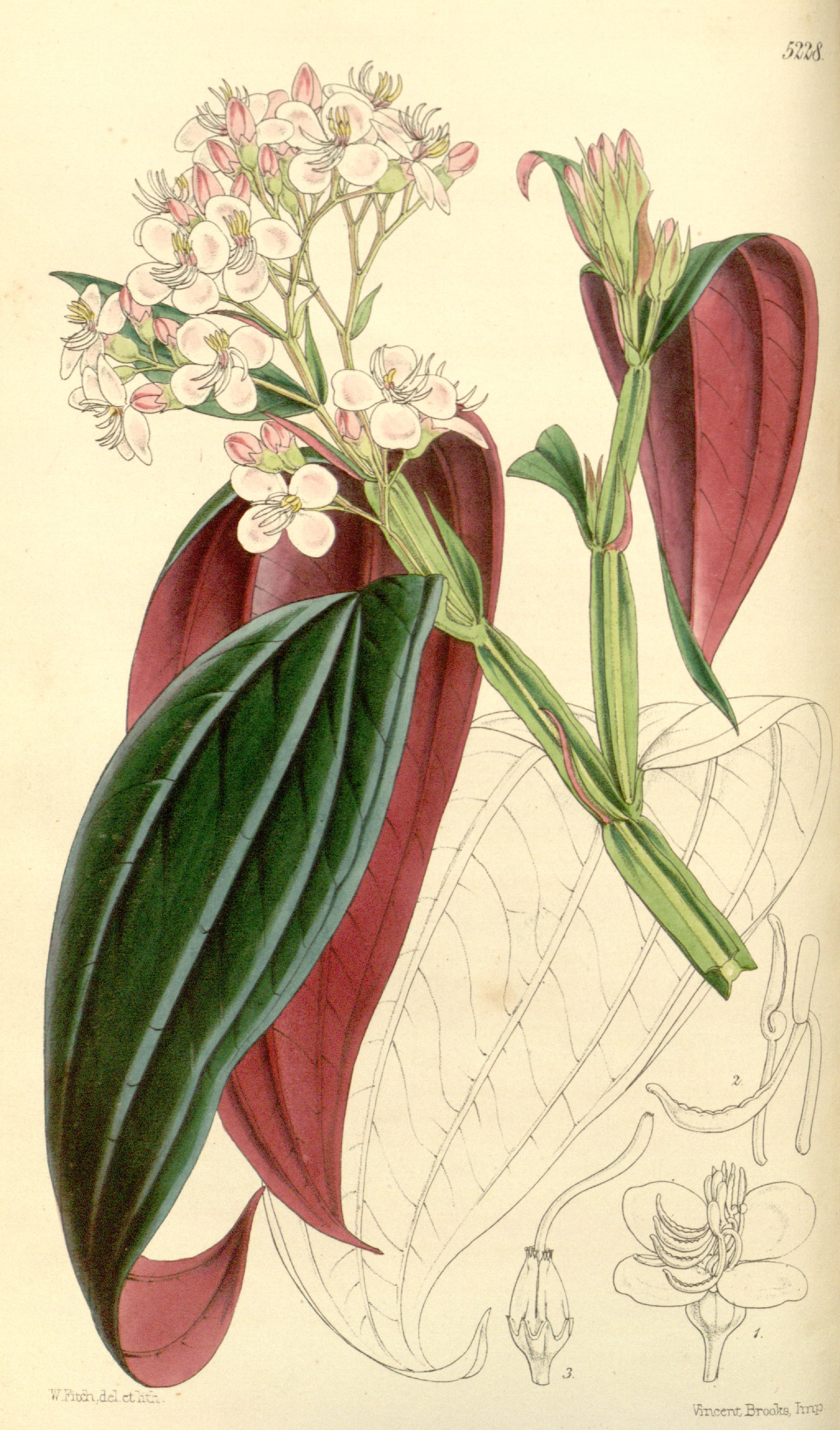 Centradenia grandifolia, Melastomataceae